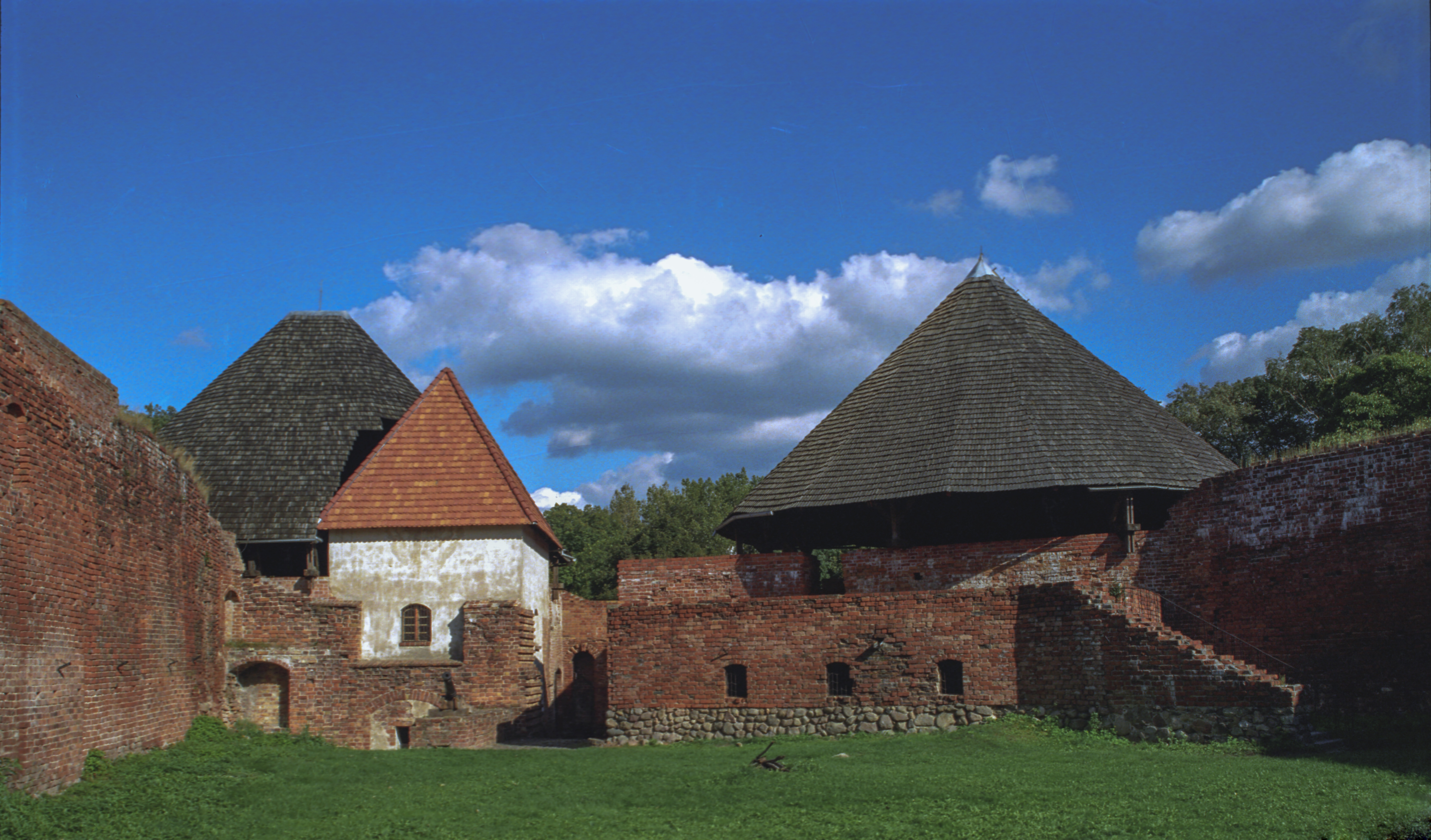 Międzyrzecz